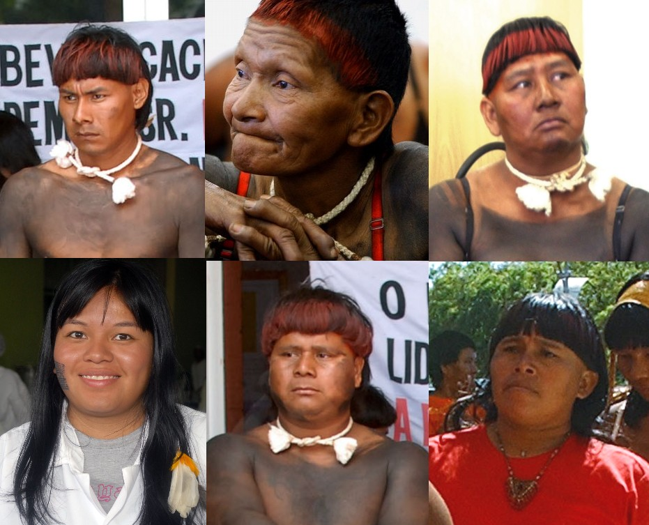 Xavante people